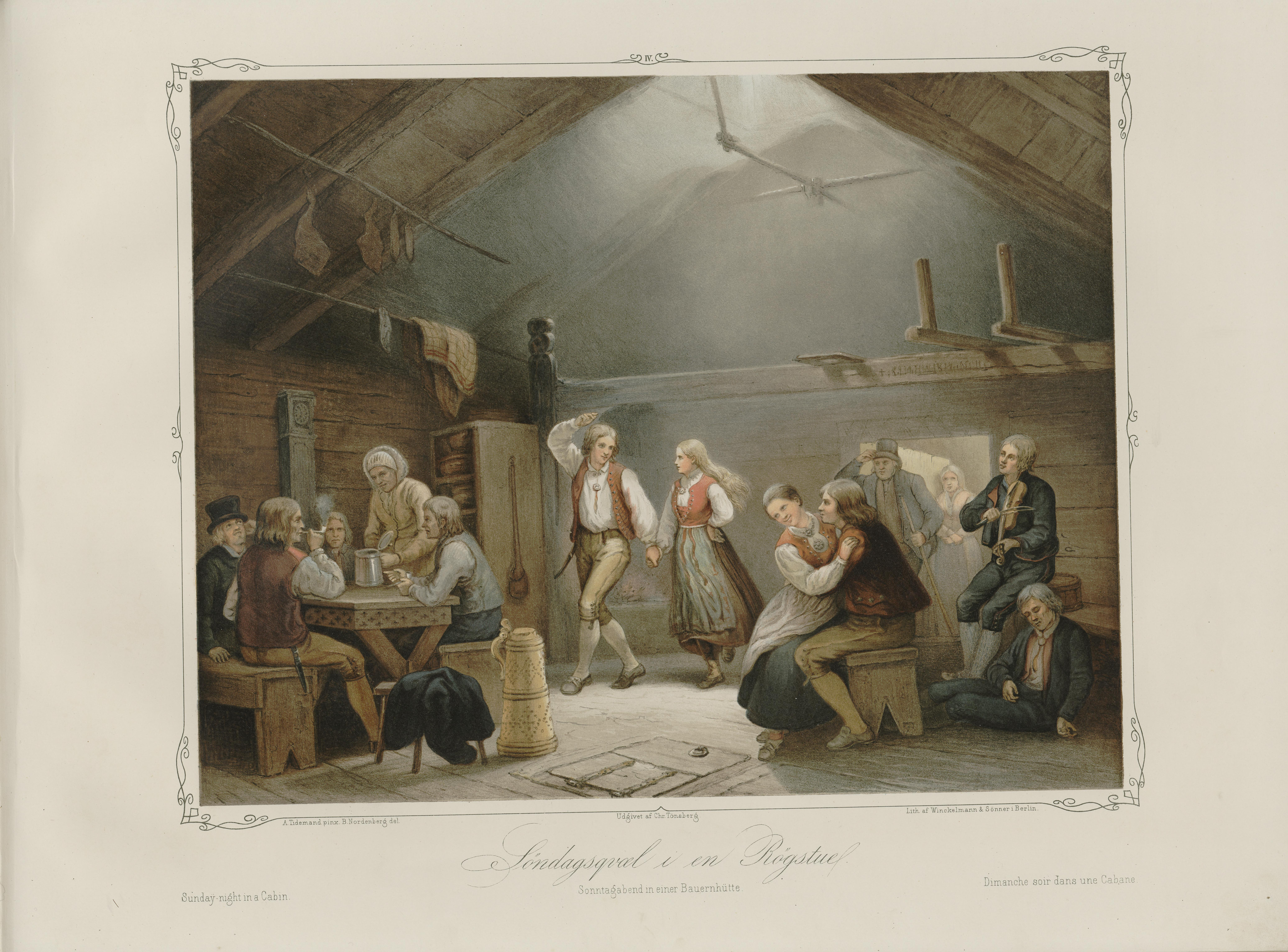 Illustrasjon hentet fra boken Norske Folkelivsbilleder av Tidemand, Adolph og utgitt av Chr. Tønsberg (Christiania, 1854)